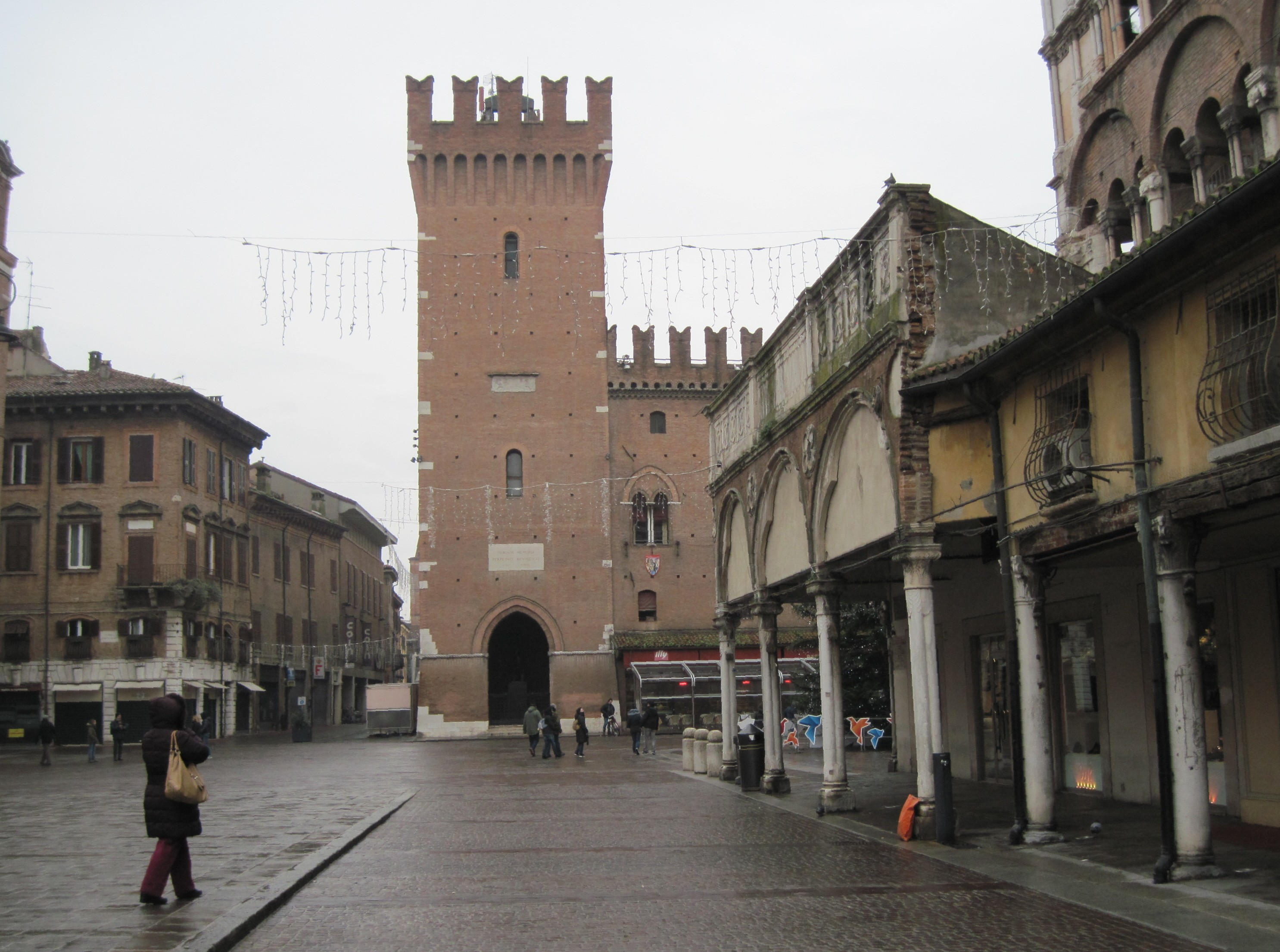 Ferrara - Torre della Vittoria - piazza Trento e Trieste periodo natalizio